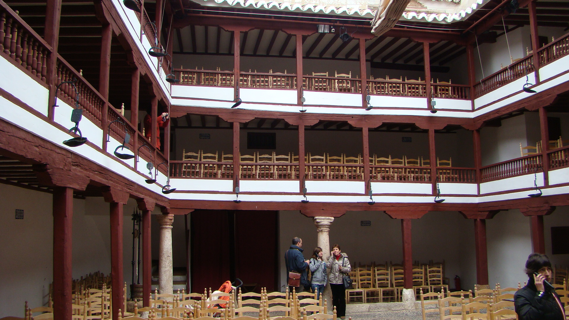 Alojería del Corral de Comedias de Almagro (España)